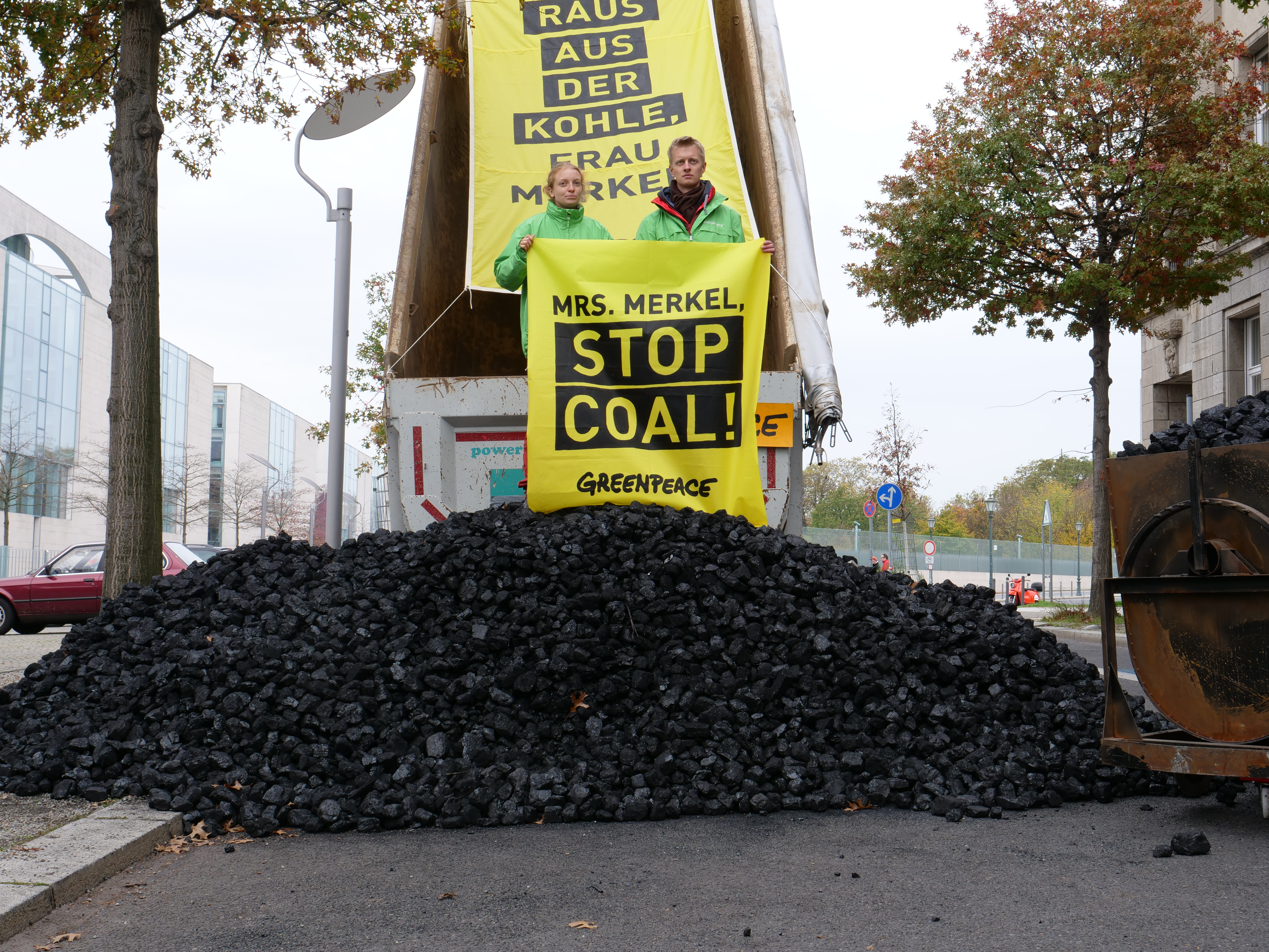 Bei der Protestaktion vor dem Kanzleramt hatte Greenpeace einen LKW Kohle auf die Straße geschüttet, um vor der Klimakonferenz und während der Sondierungsgespräche einen Kohleausstieg zu fordern.